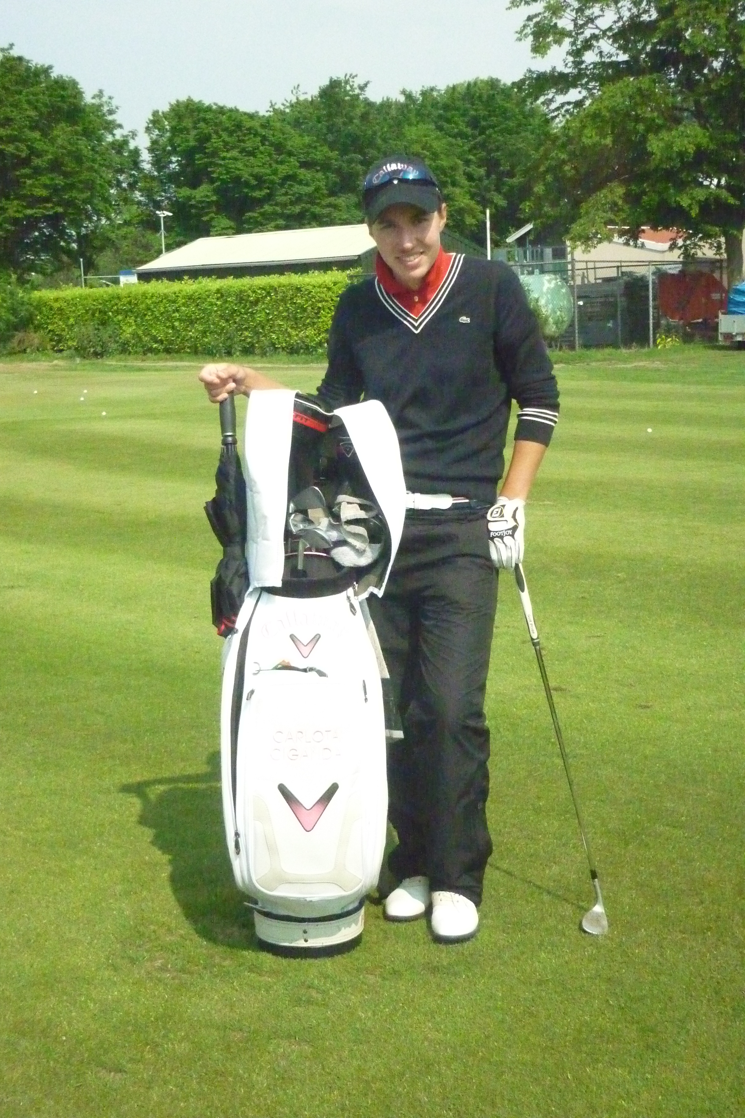 Carlota Ciganda at Dutch Ladies Open